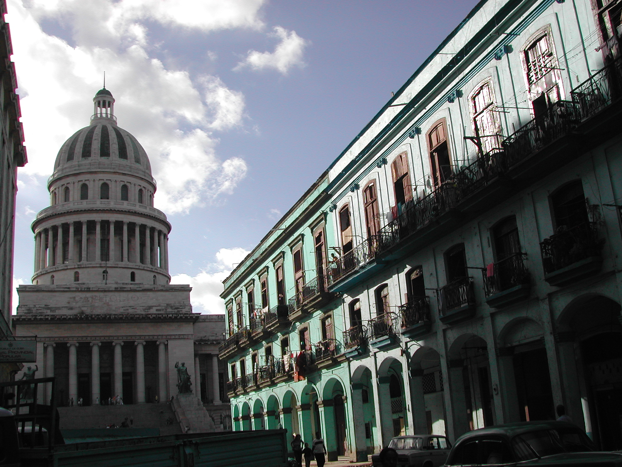 La Habana, Cuba